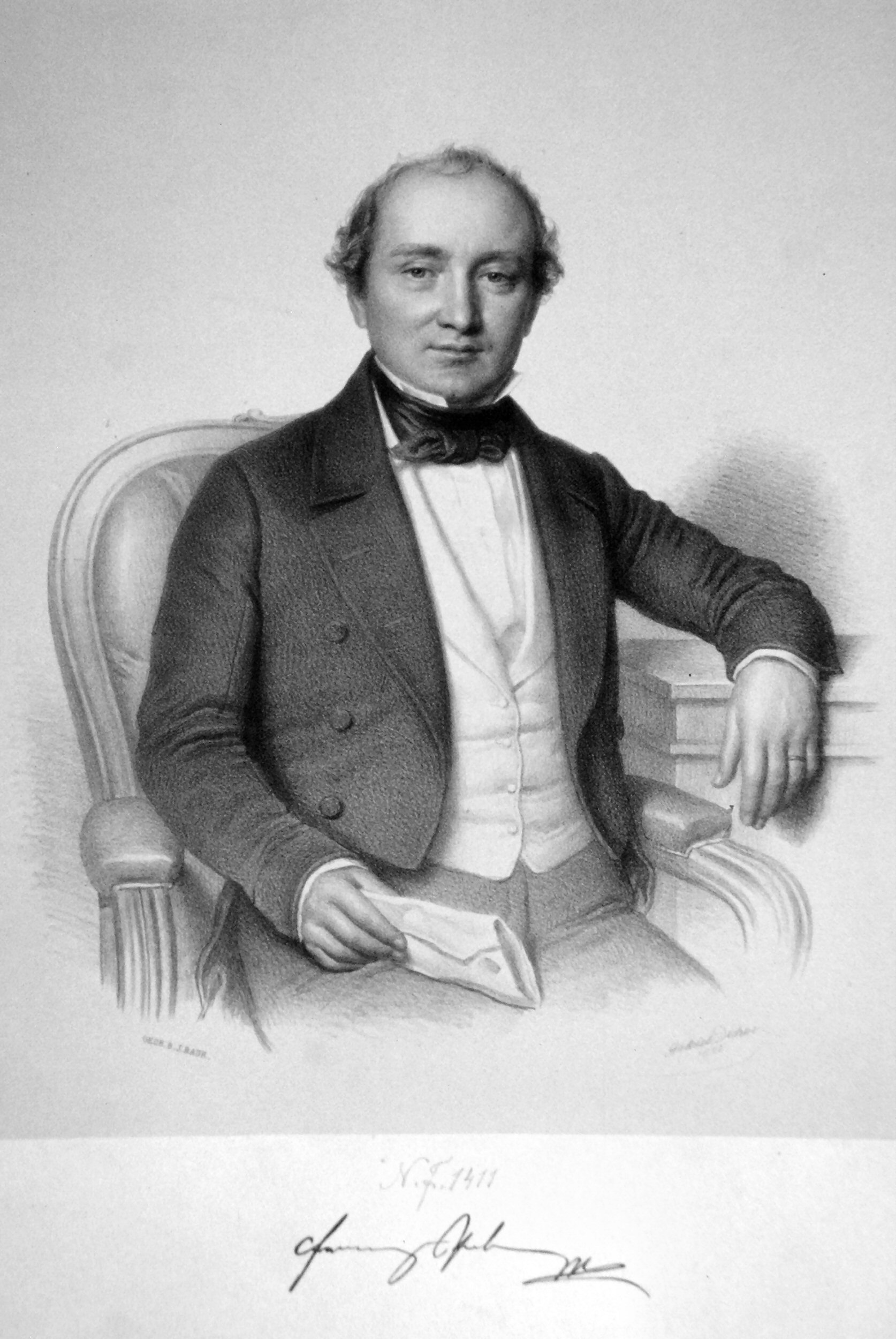 Franz Pokorny (1797-1850), als Theaterdirektor leitete er das Theater in der Josefstadt und das Theater an der Wien. Lithographie von Gabriel Decker, 1850